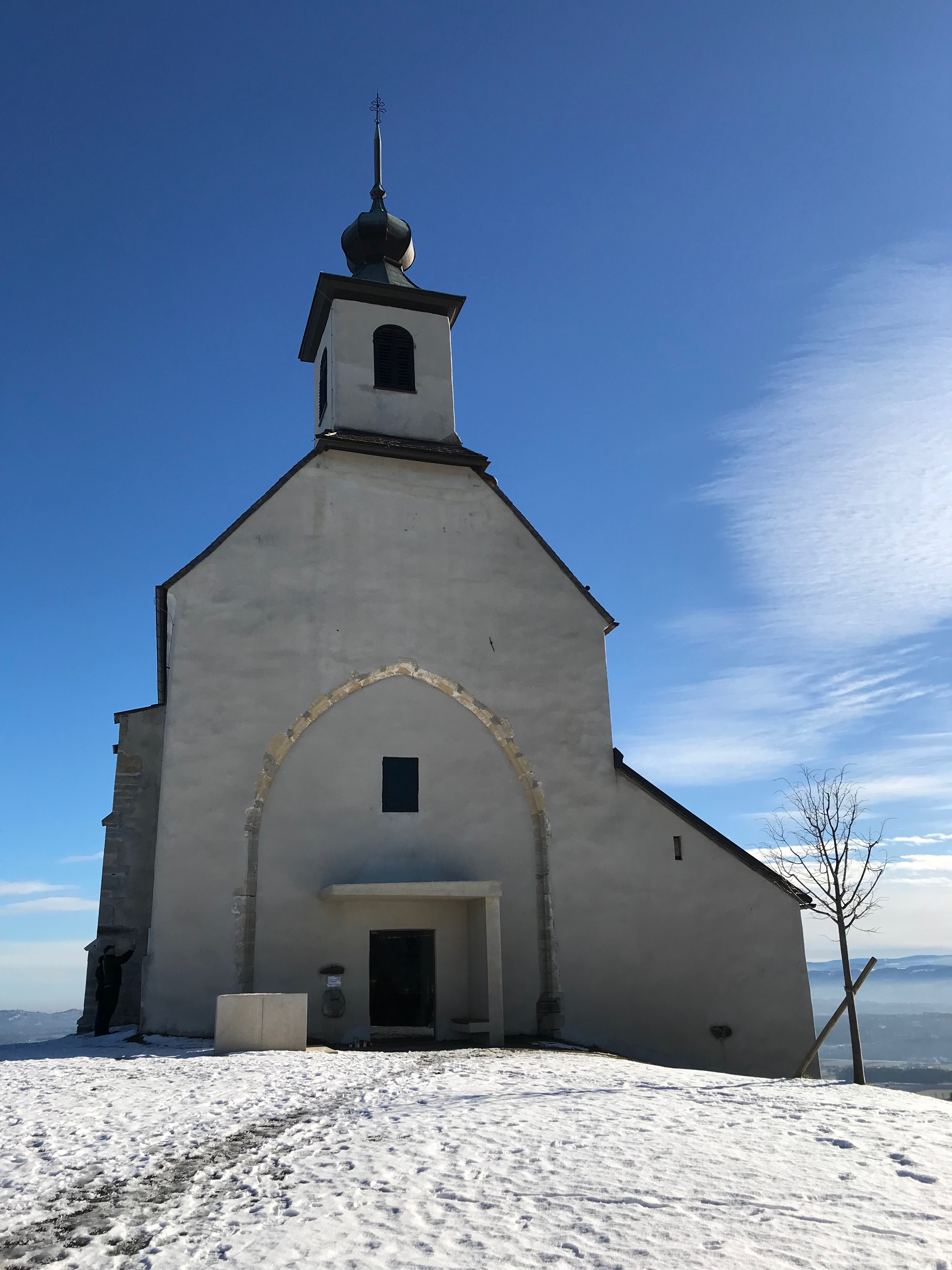 Filialkirche St. Wolfgang, Hollenegg